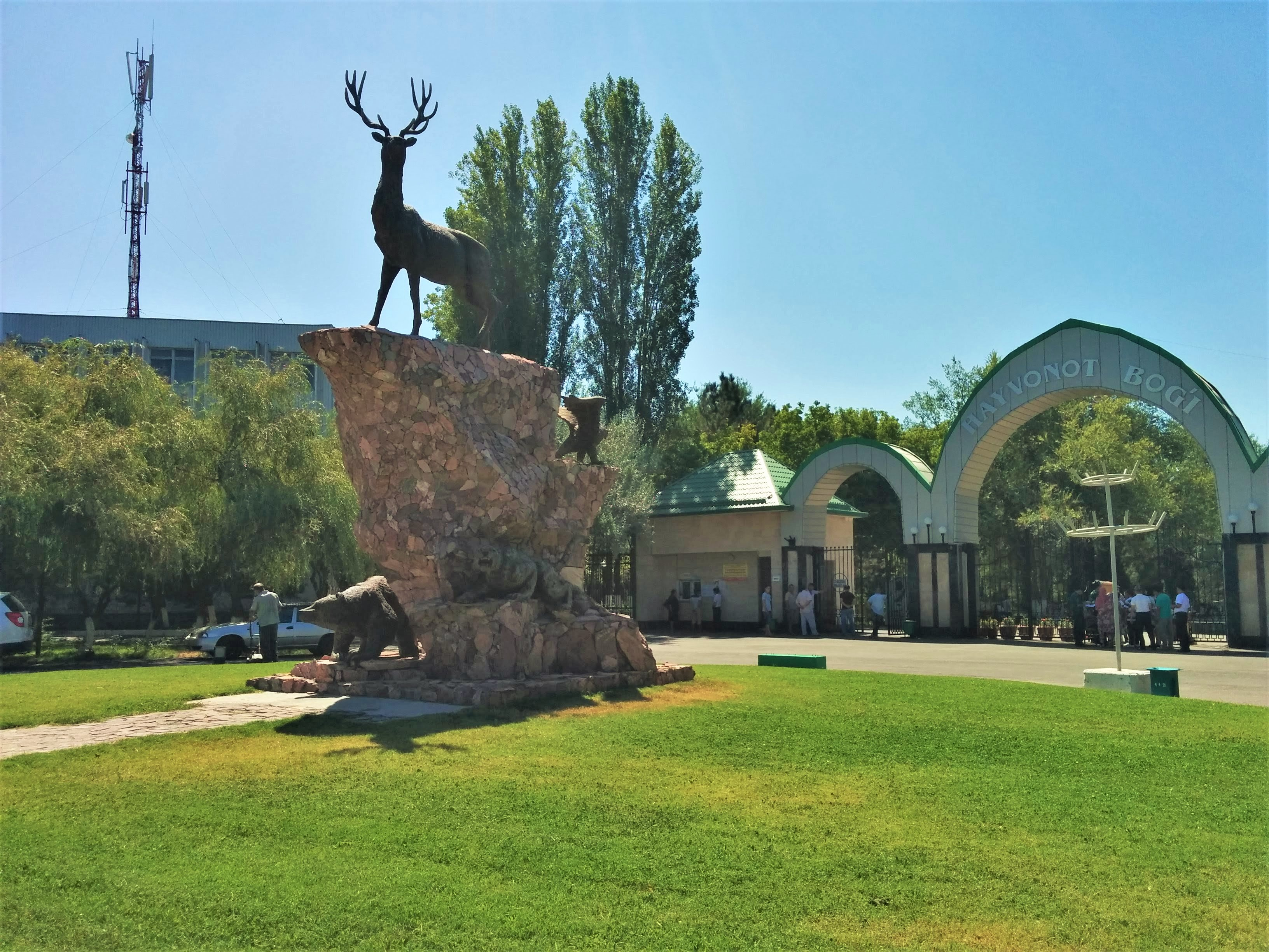 Ташкентский зоопарк